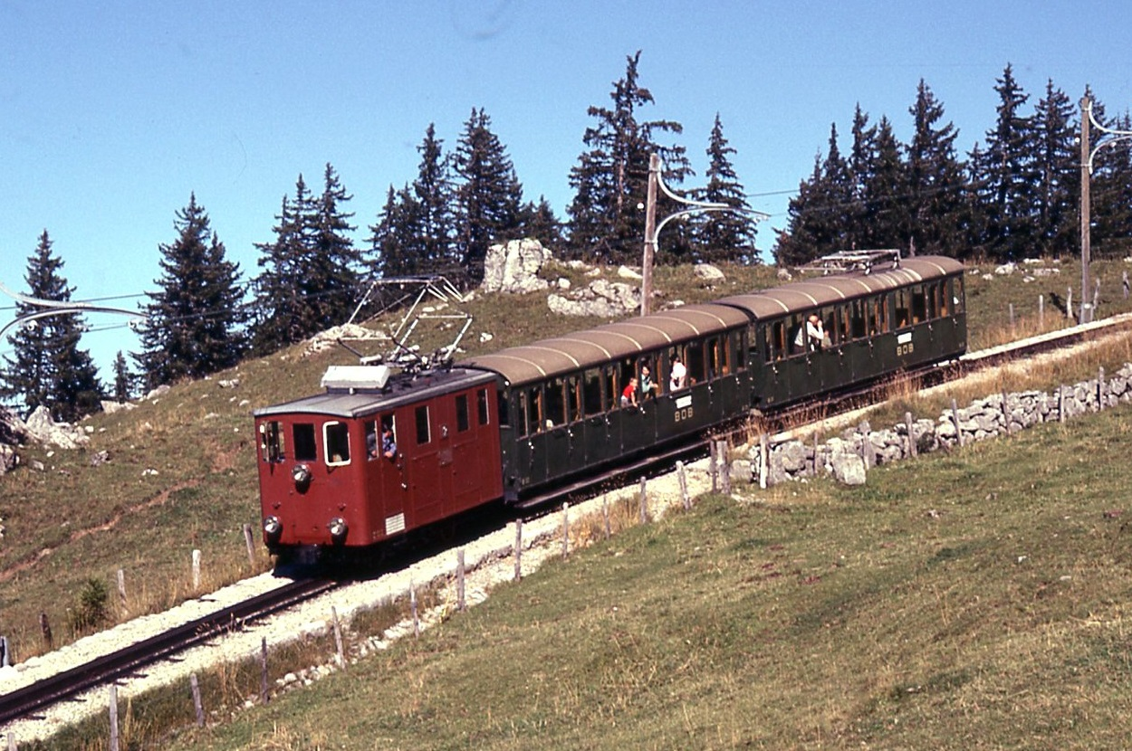 Die-Schynige-Platte-Bahn mit 800 mm Schmalspur und einer Länge von 7,2 Kilometern wurde im Juni 1893 eröffnet.